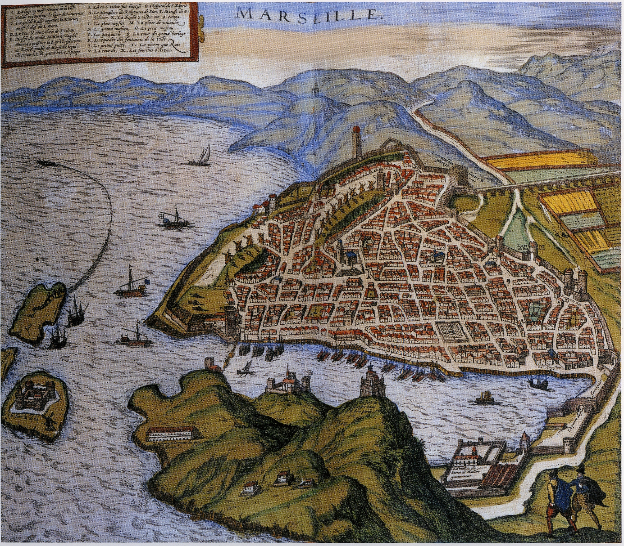 Carte de Marseille, gravure extraite de l'Atlas de Braun et Hogenberg : Civitates Orbis Terrarum'